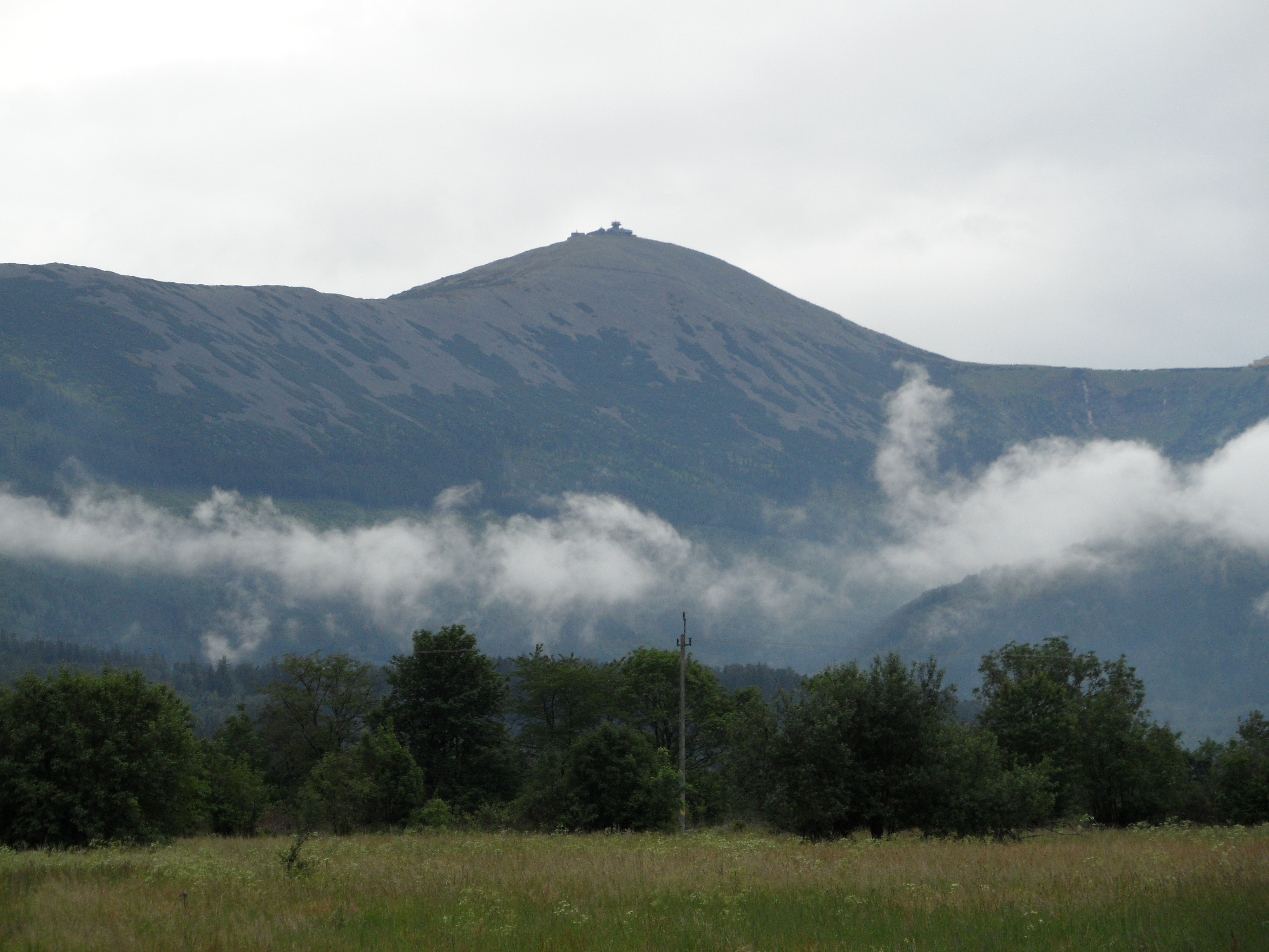 Karkonosze w chmurach